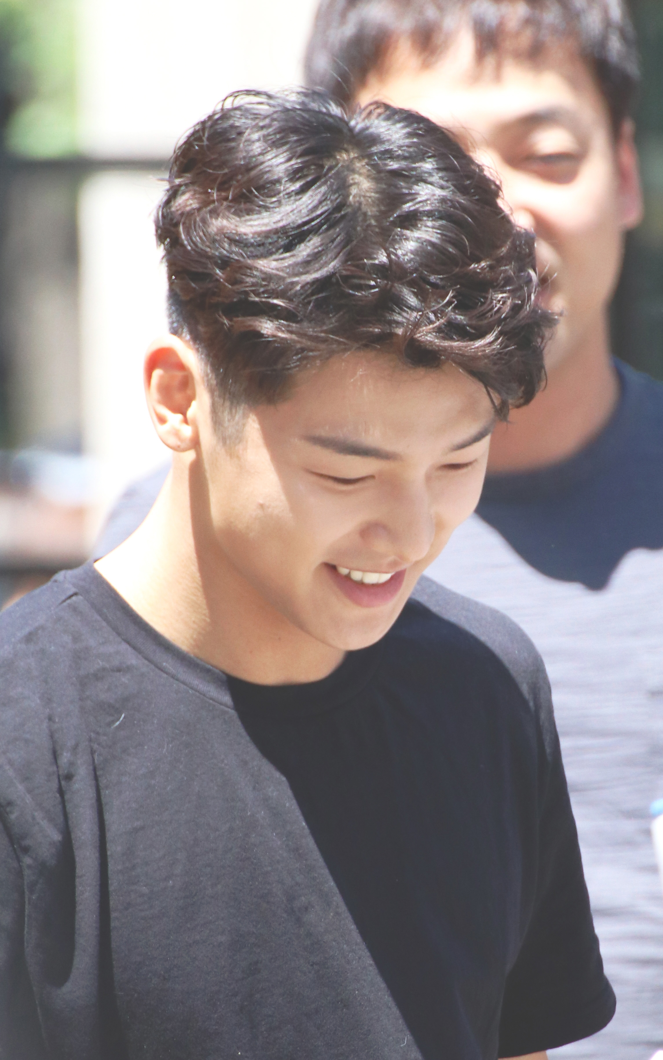 160826 강민혁 뮤직뱅크 출근